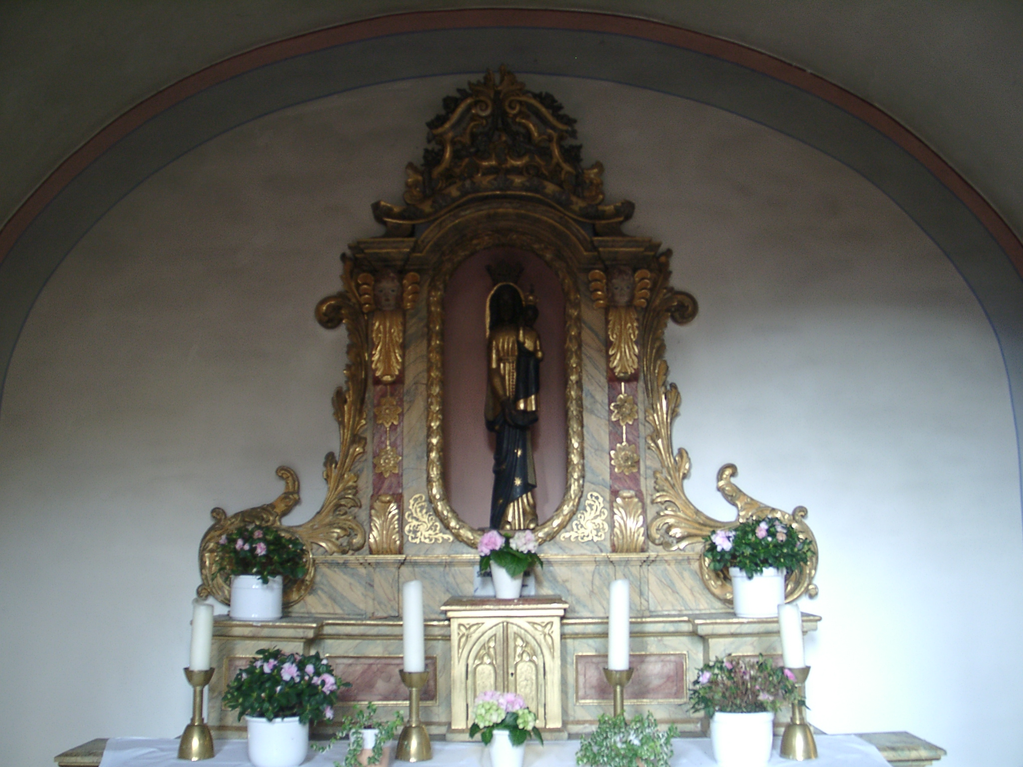 Beilstein an der Mosel Beilstein (Mosel), Karmeliterkirche - schwarze Madonna